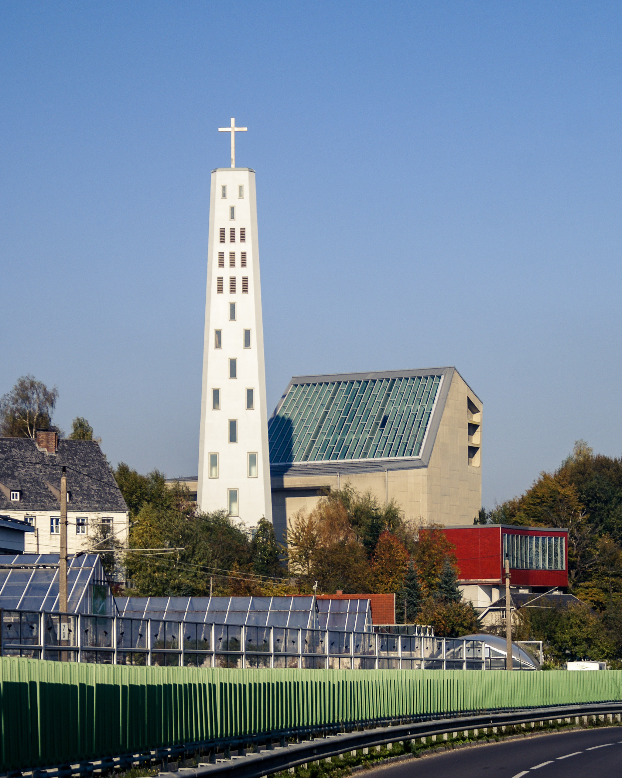 Kath. Pfarrkirche Hl. Geist, Lenzing, Oberösterreich. Südansicht.